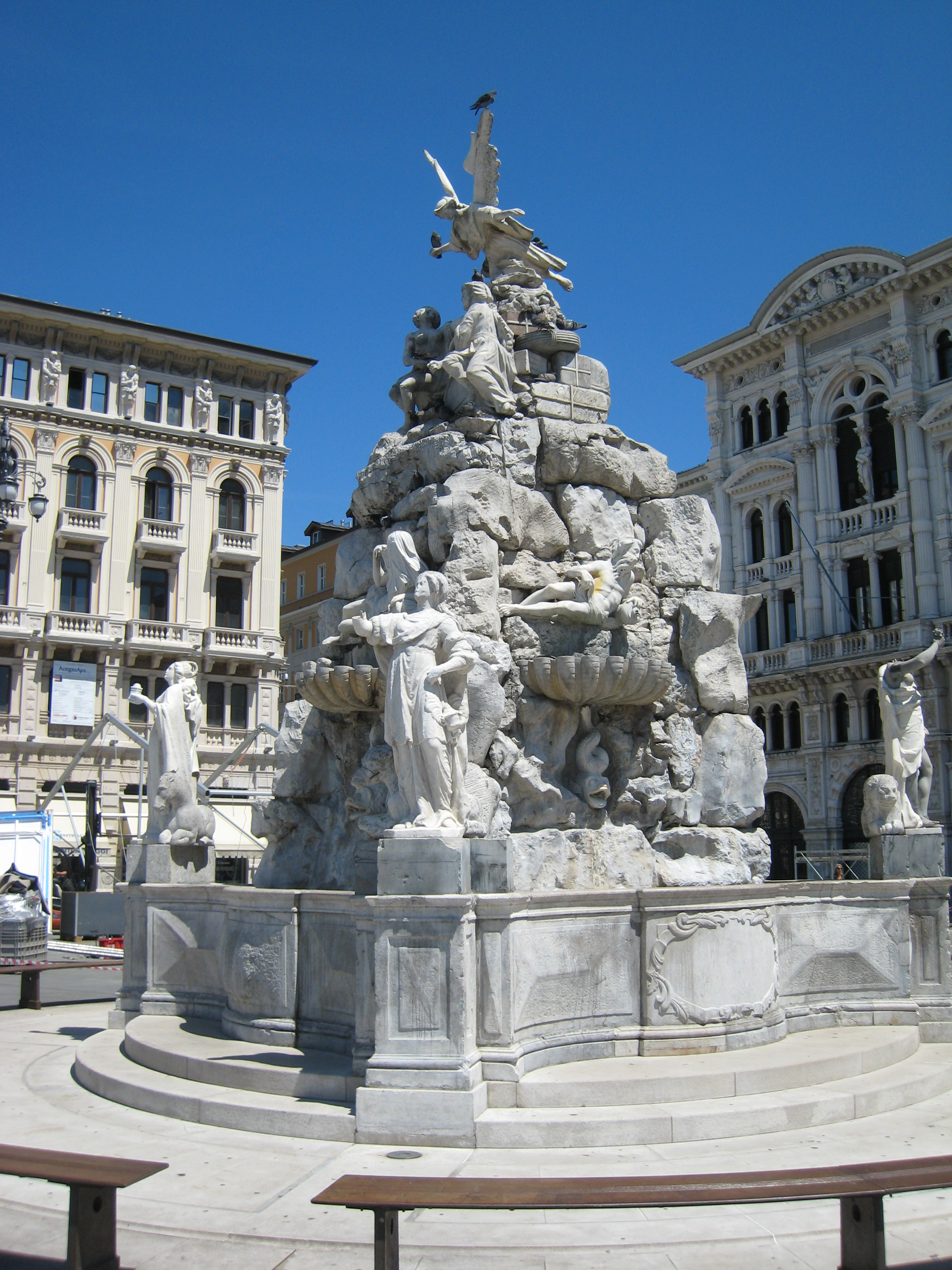 La fontana del Mazzoleni in piazza Unità d'Italia a Trieste. Febbraio 2008